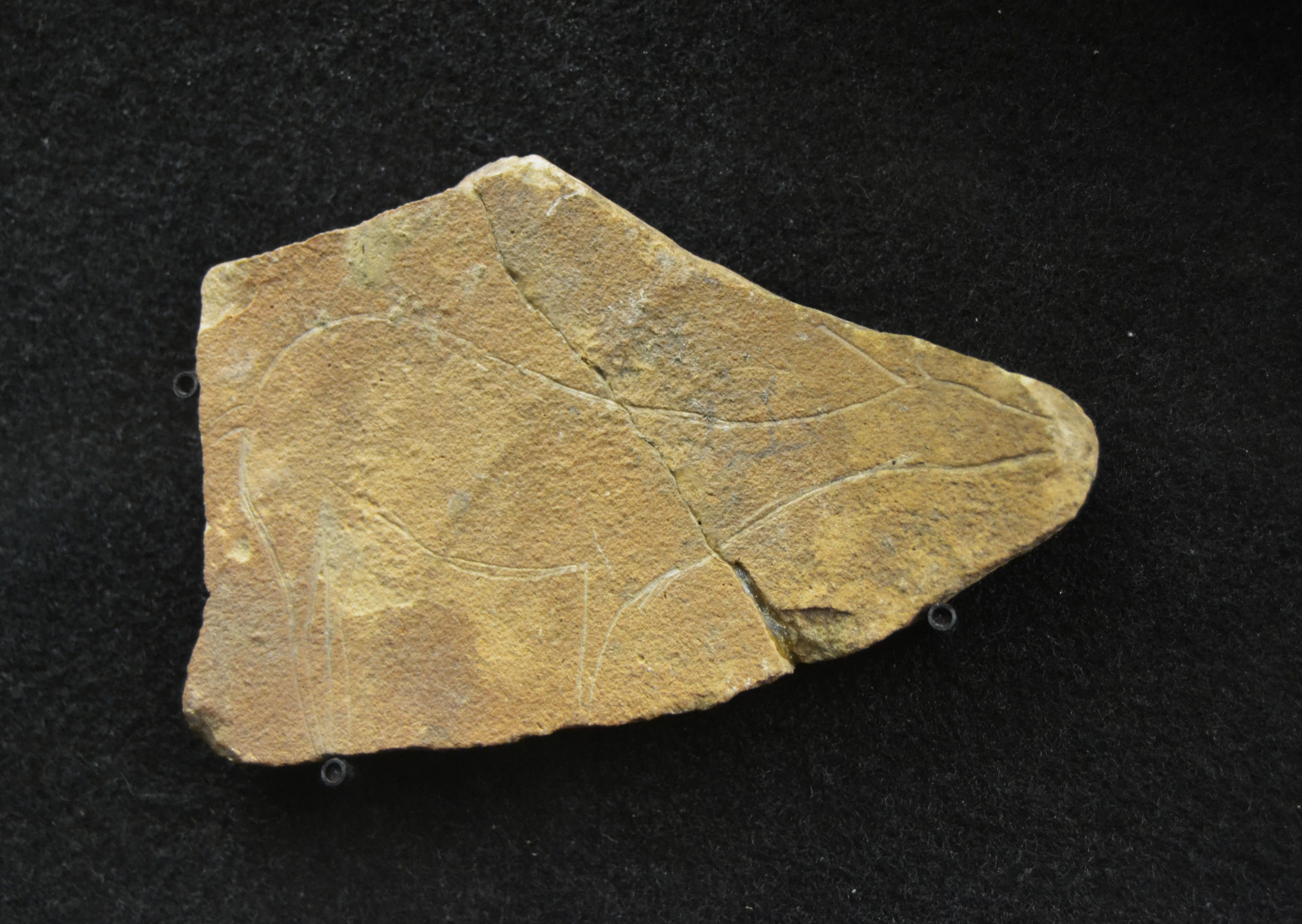 Plaqueta amb gravat de cérvola, cova del Parpalló, Solutrià mitjà.